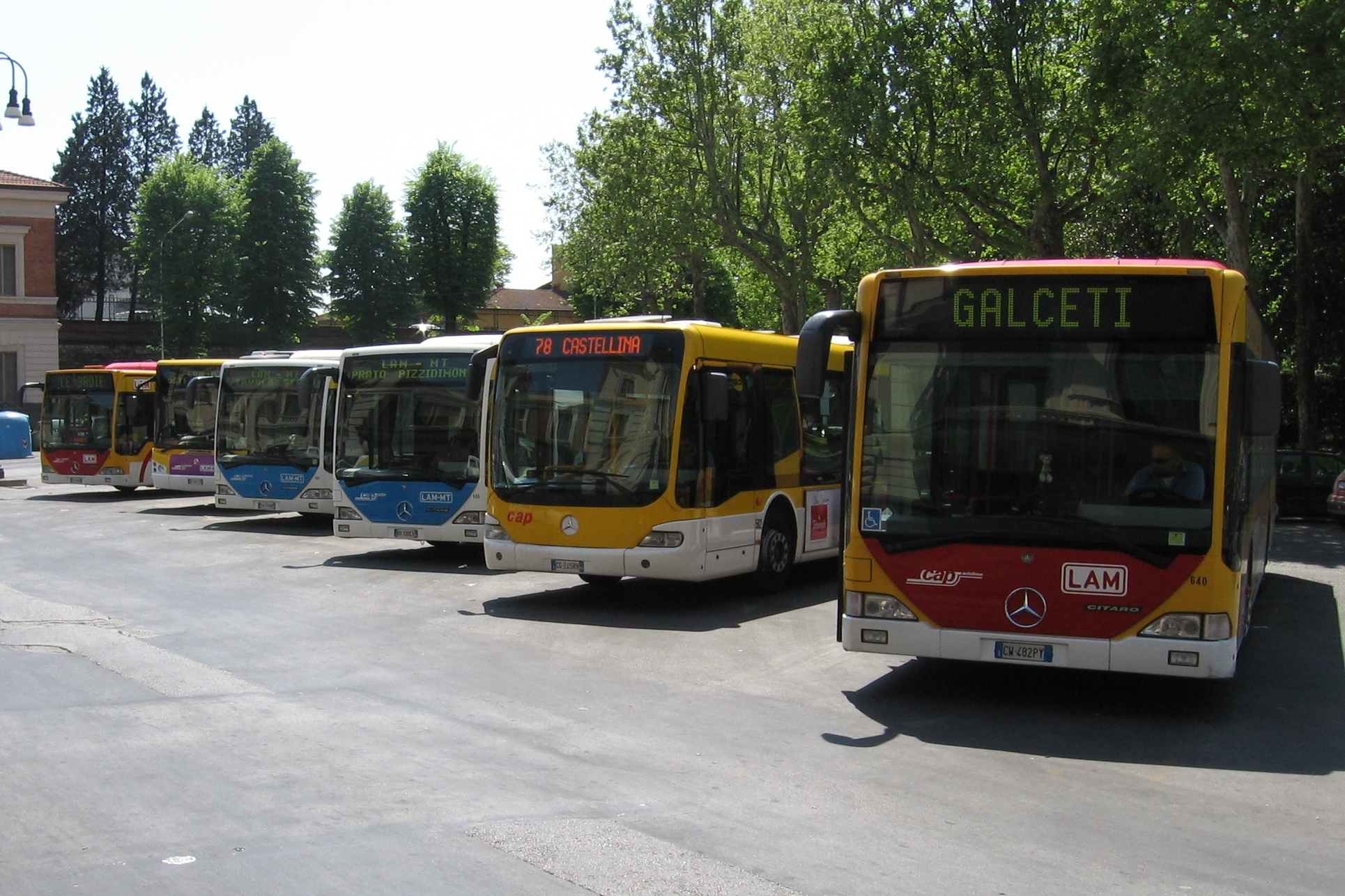 Autobus della CAP fermi al capolinea in piazza della Stazione.